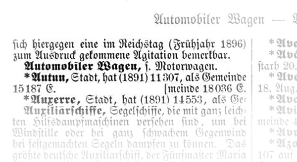 Brockhaus' Konversationslexikon von 1896 enthält zwar einen Eintrag zum Automobil („Automobiler Wagen“), verweist jedoch auf den in der Anfangszeit des Automobils gebräuchlicheren Begriff "Motorwagen"